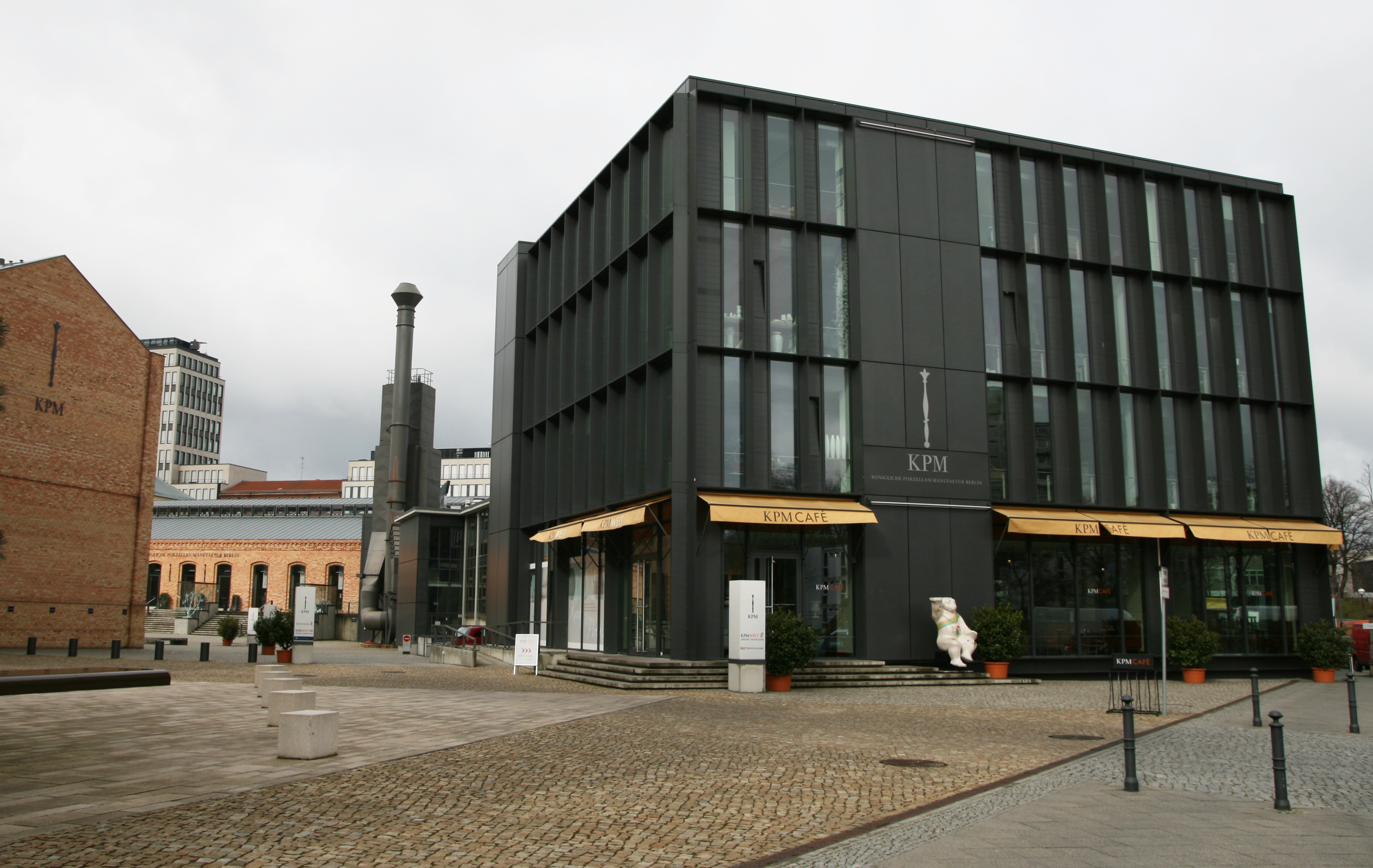 Buildings of the "Königliche Porzellan-Manufaktur Berlin"